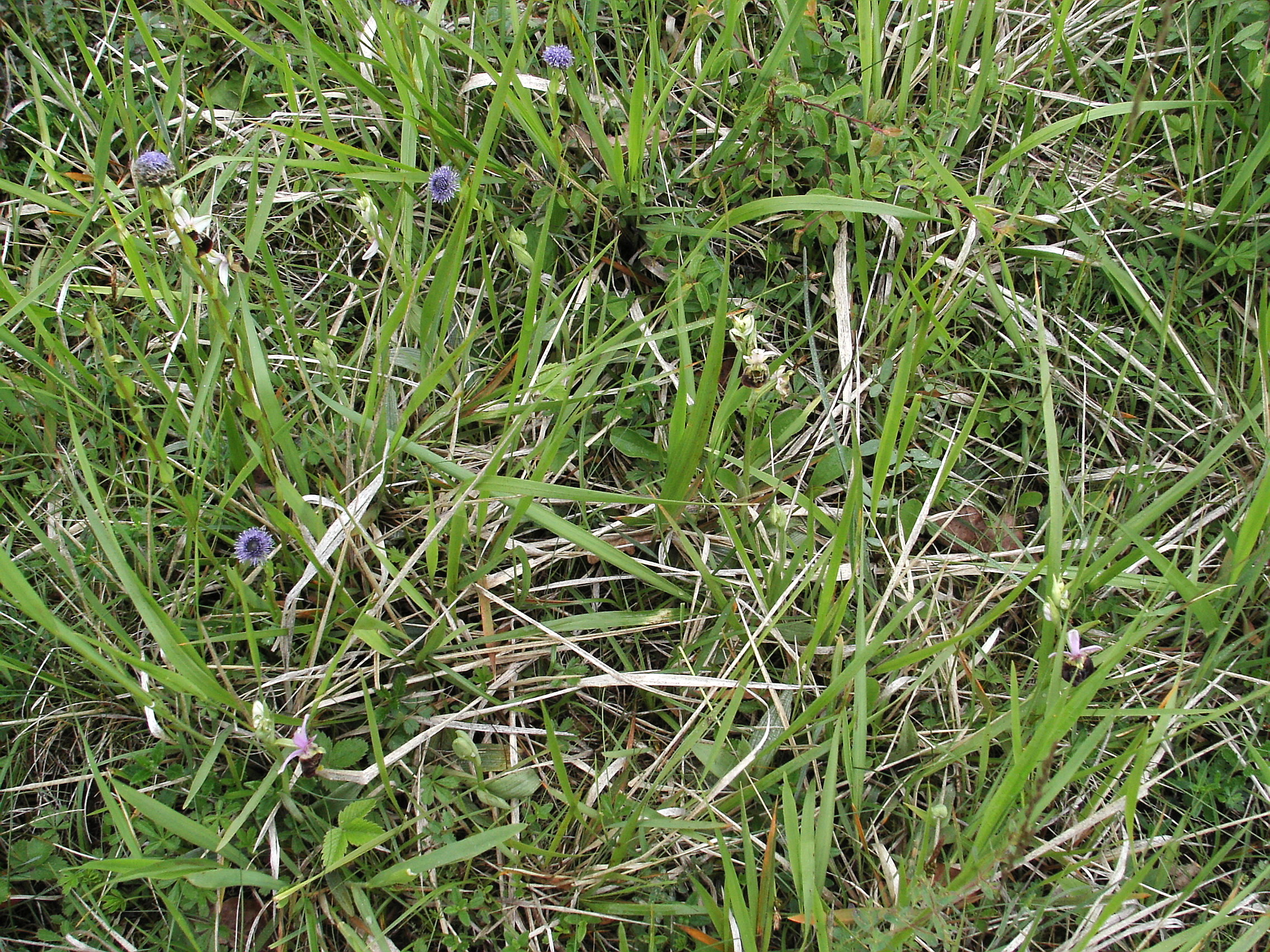 Limestone grassland, Tienne Breumont, Nismes (Belgium)